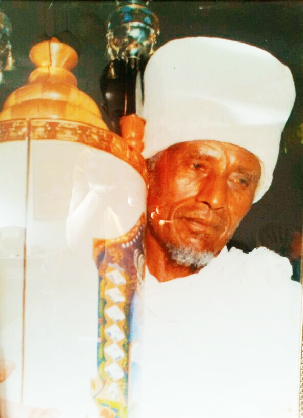 קייס מוגס אייסו